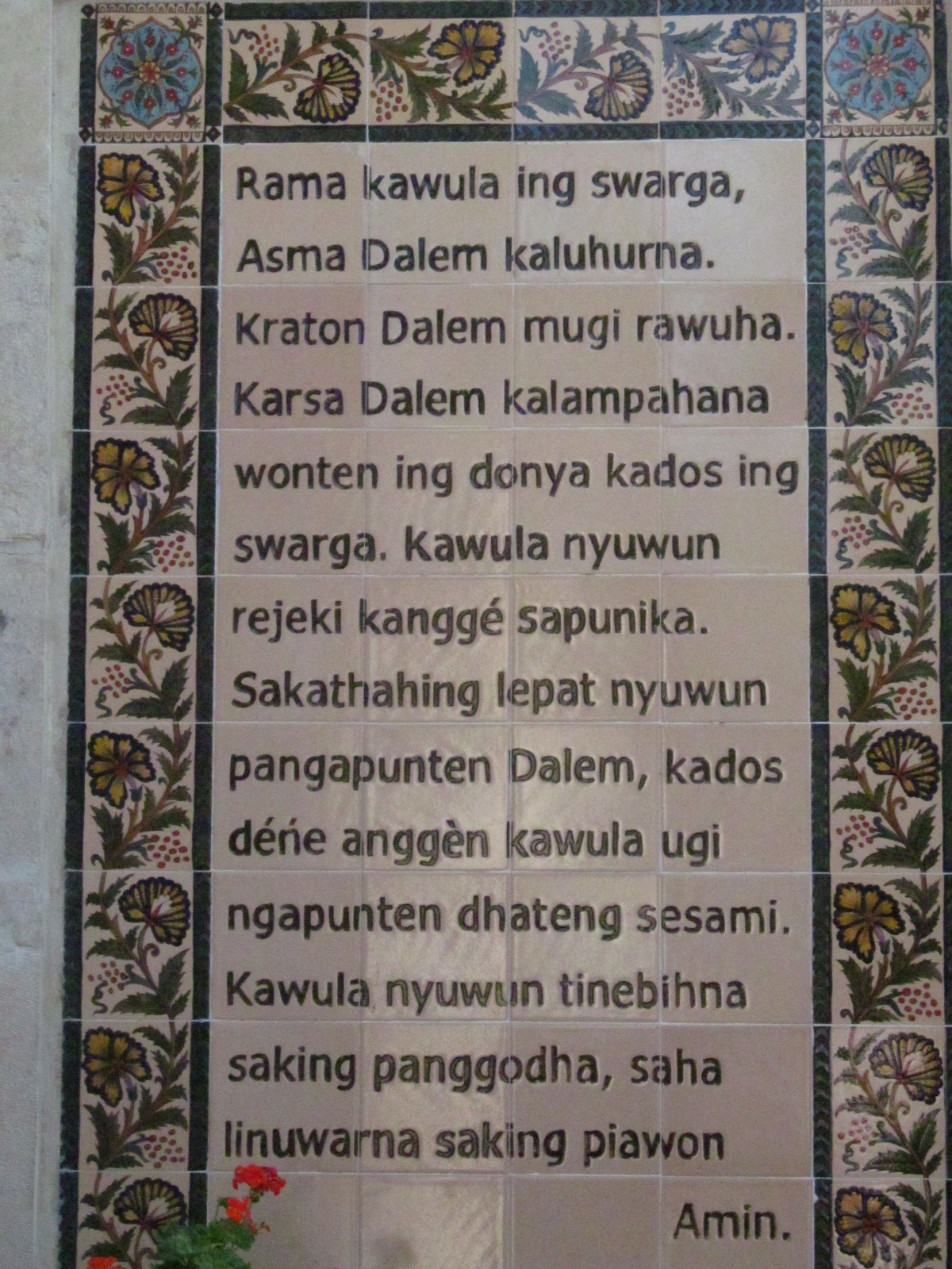 Meieisapalve jaava keeles